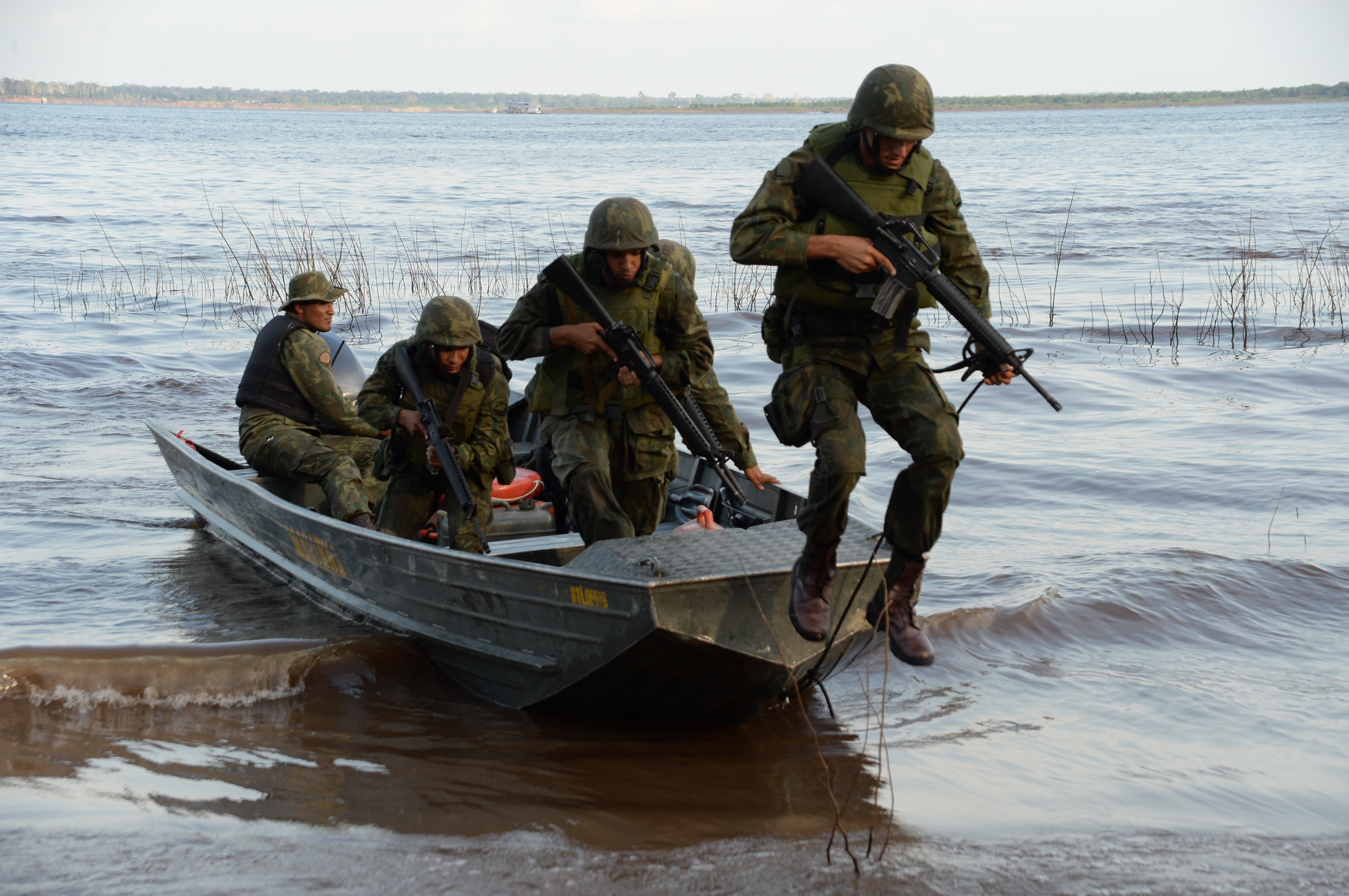 14/10/2014, Manaus - AM Fotos: Jorge Cardoso